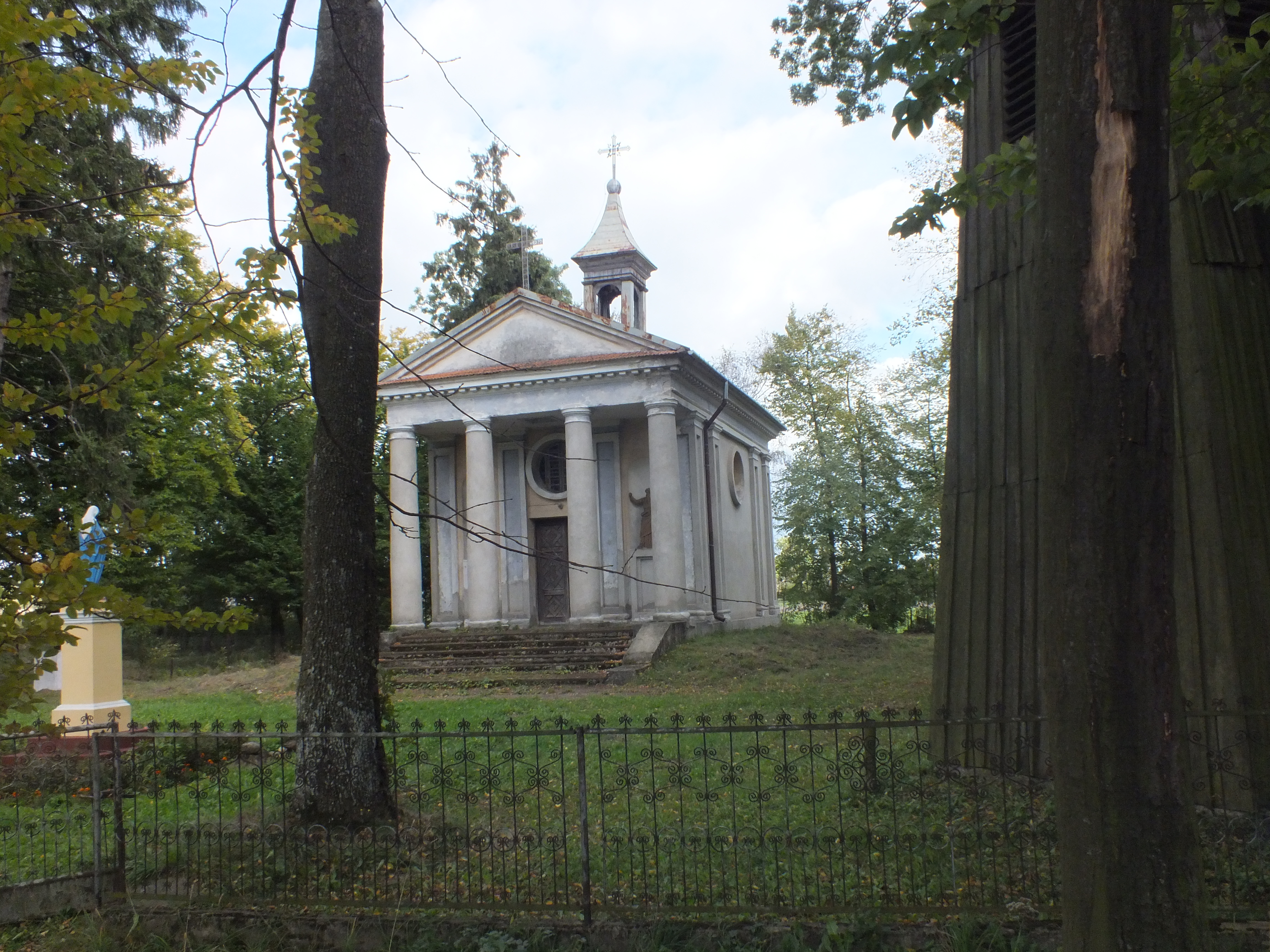 Komarno-Kolonia - rzymskokatolicki kościół parafialny p.w. św. Stanisława, 1844